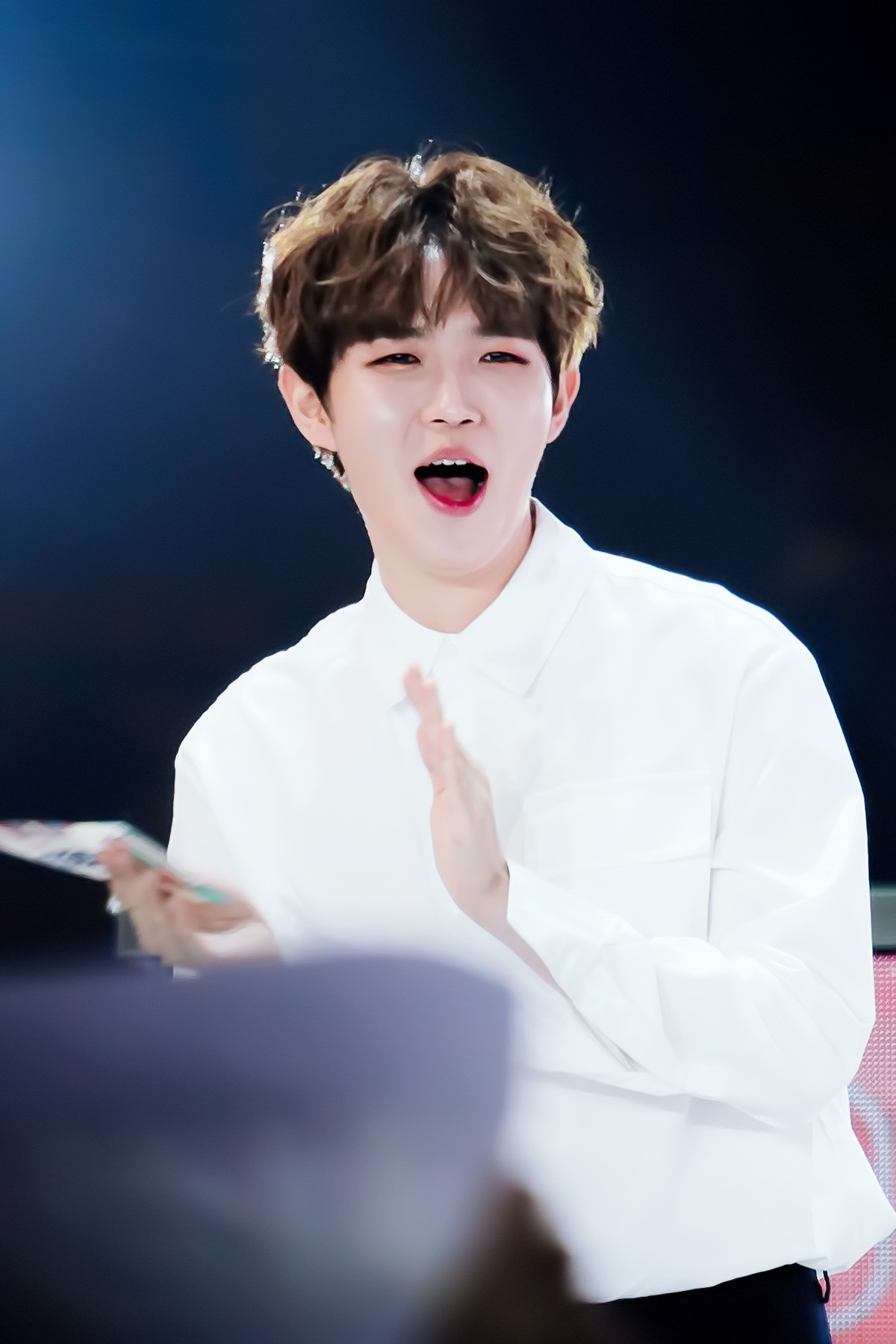 171022 부산원아시아페스티벌